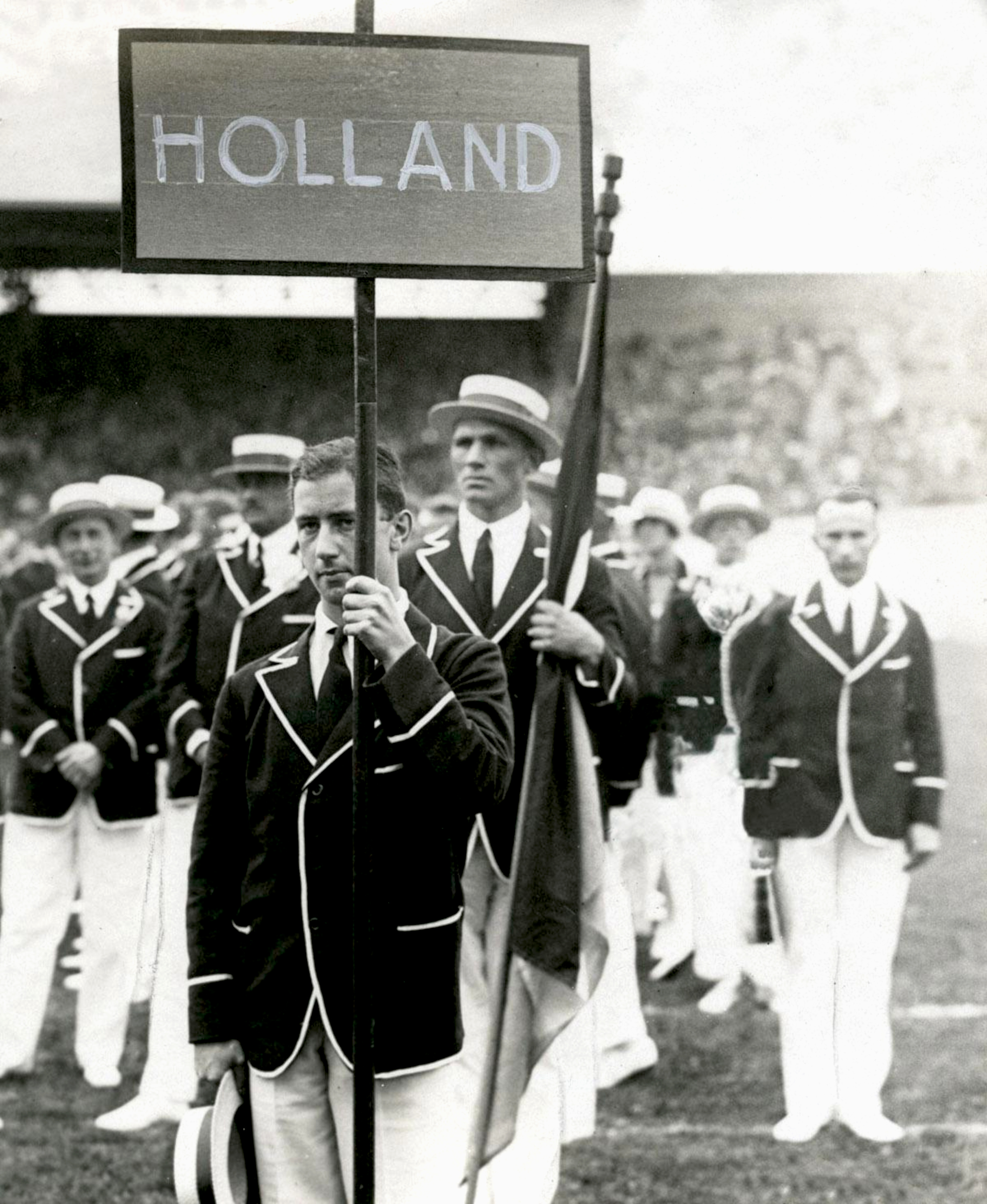 Intocht Nederlandse Olympische ploeg bij de opening van de Olympische Spelen 1928 in het Olympisch Stadion in Amsterdam. Bijschrift: De bokser Sam Olij was de Hollandse banierdrager. Rechts van hem Harry Dénis, die de eed aflegde.""